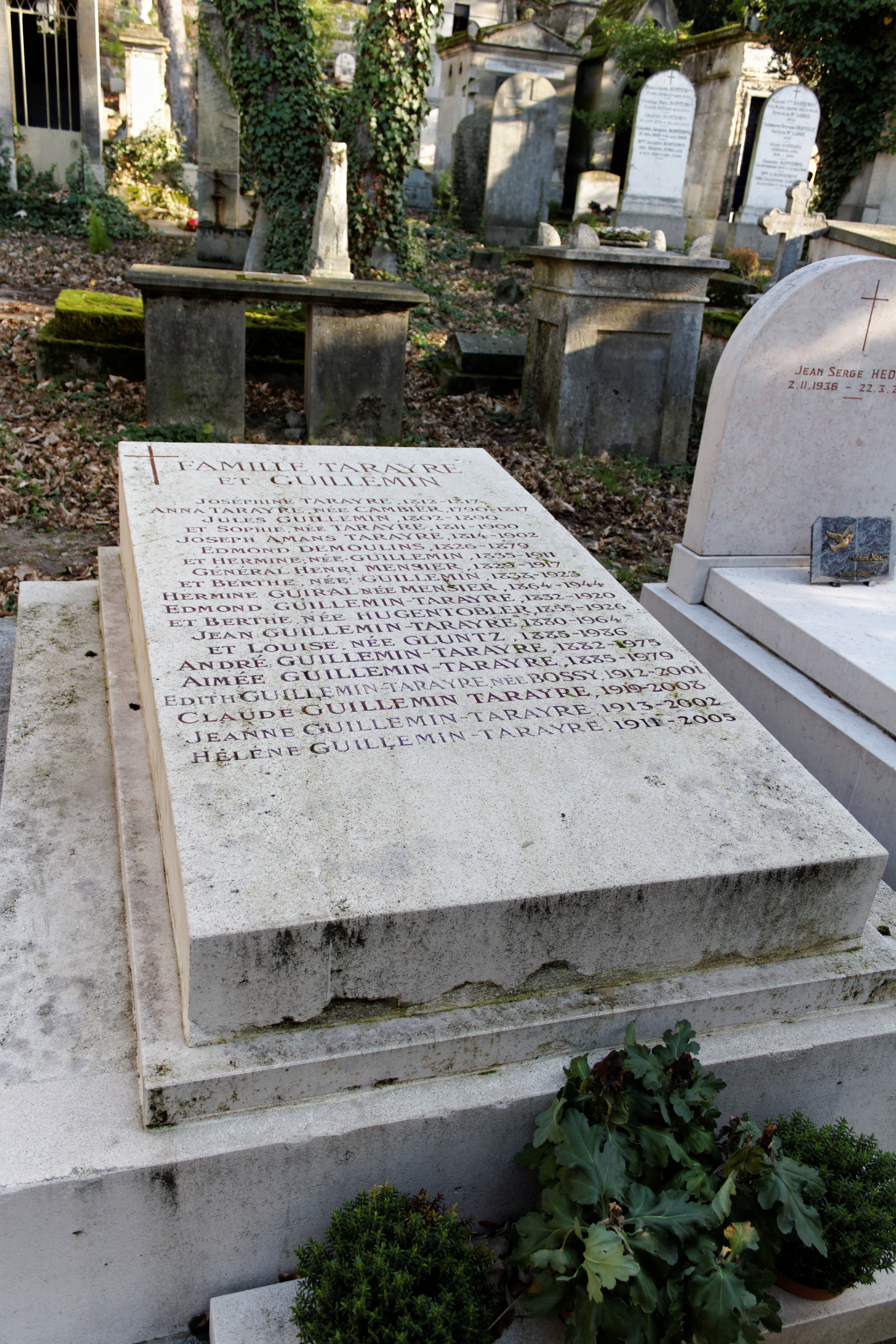 Sépulture de Joseph Henri Mensier (1829-1917), général ; Edmond Guillemin-Tarayre (1832-1920), membre de l'expédition scientifique du Mexique.